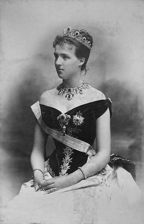 Porträt Amélies, der späteren Königin von Portugal